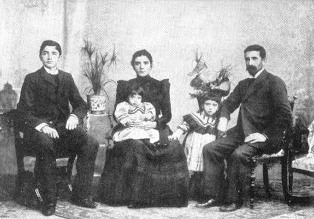 Alfonso Daniel Rodríguez Castelao cos seus pais, Joaquina Castelao Genme e Mariano Rodríguez Dios, e irmás, Josefina e Teresa, en Buenos Aires, días antes de retornar a Galicia